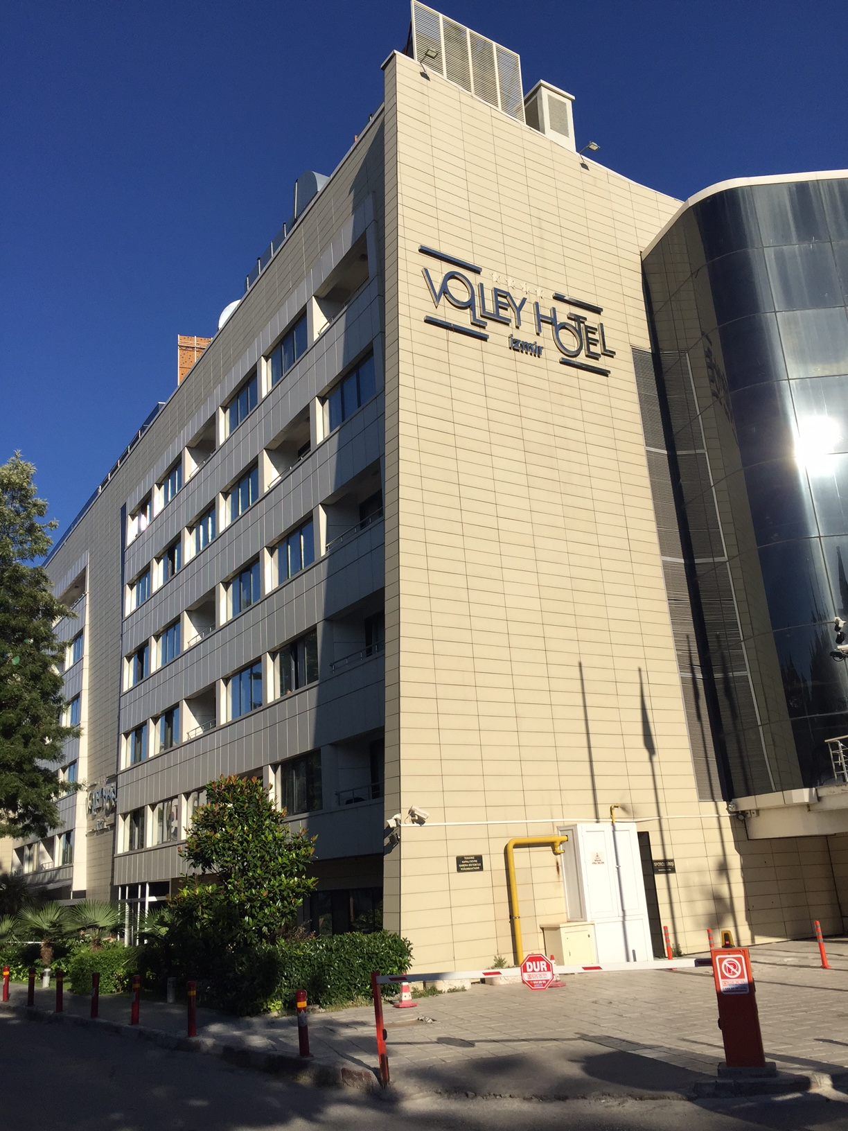 Volley Hotel İzmir